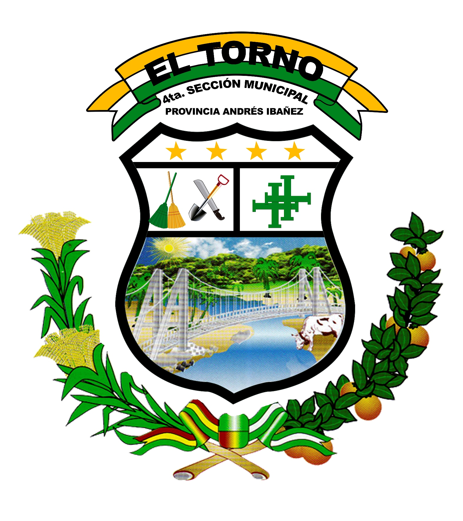 Escudo el torno del Municipio de El Torno